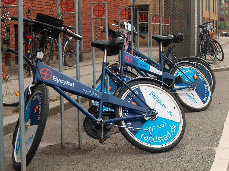 Bycykler i stativ i Århus